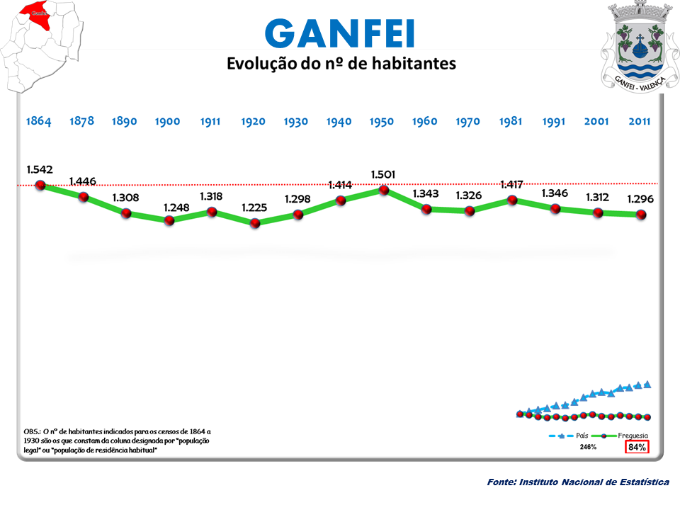 Censos 1864/2011